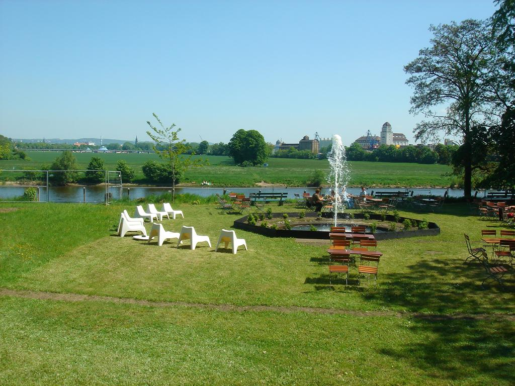 Schloss Übigau, Park mit Sommerwirtschaft